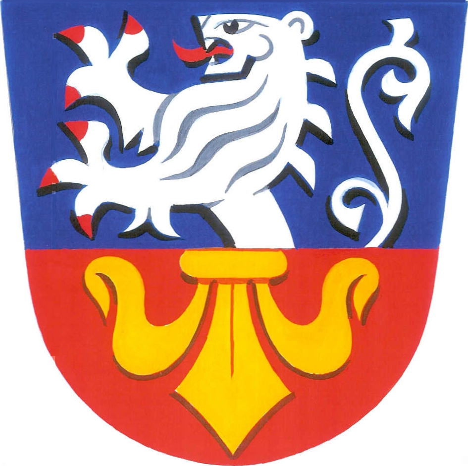 Znak obce Hajany